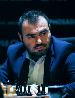 Шахрияр Мамедьяров, Турнир Претендентов 2018